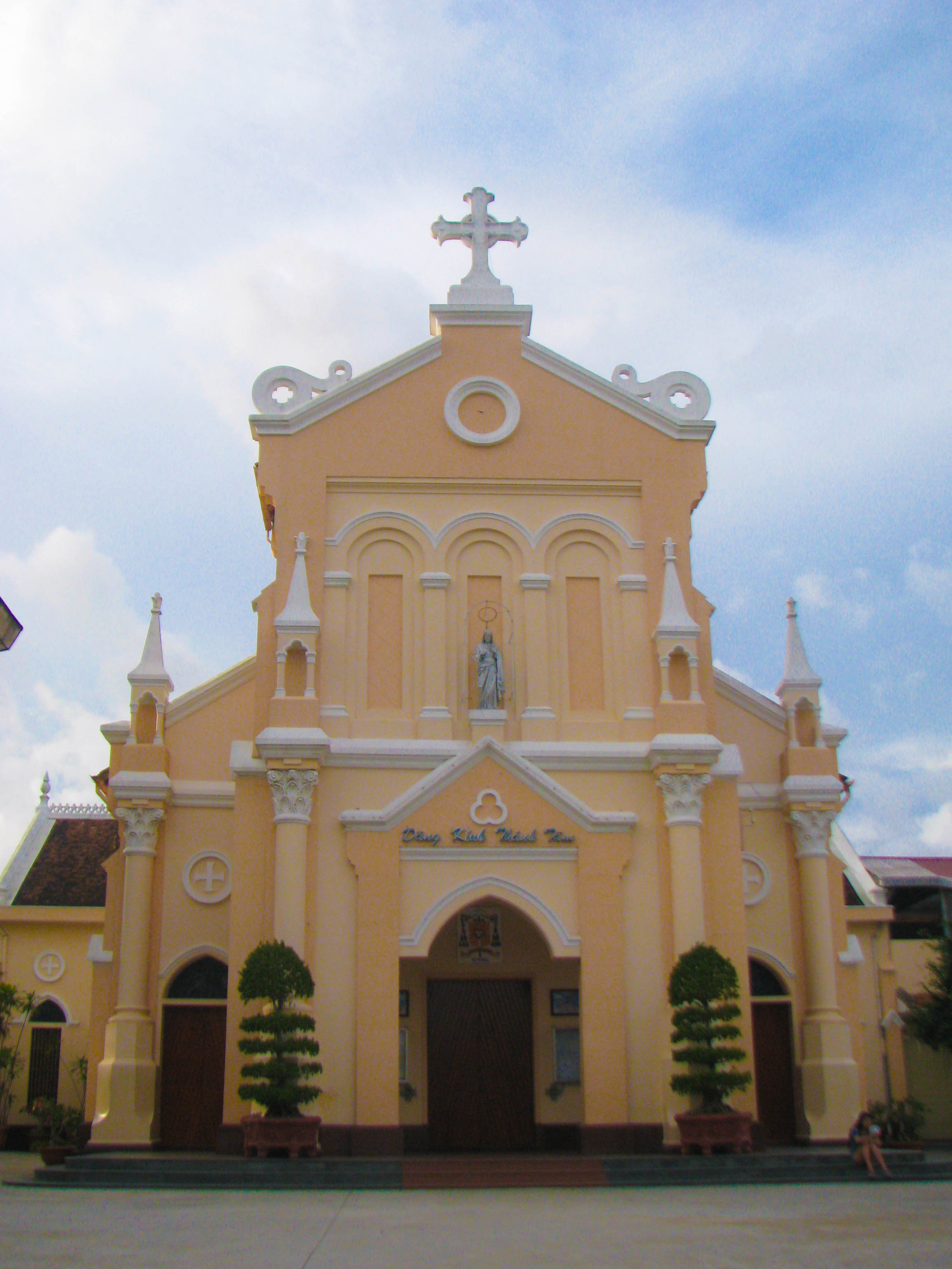 Nhà thờ chính tòa Cần Thơ 2013